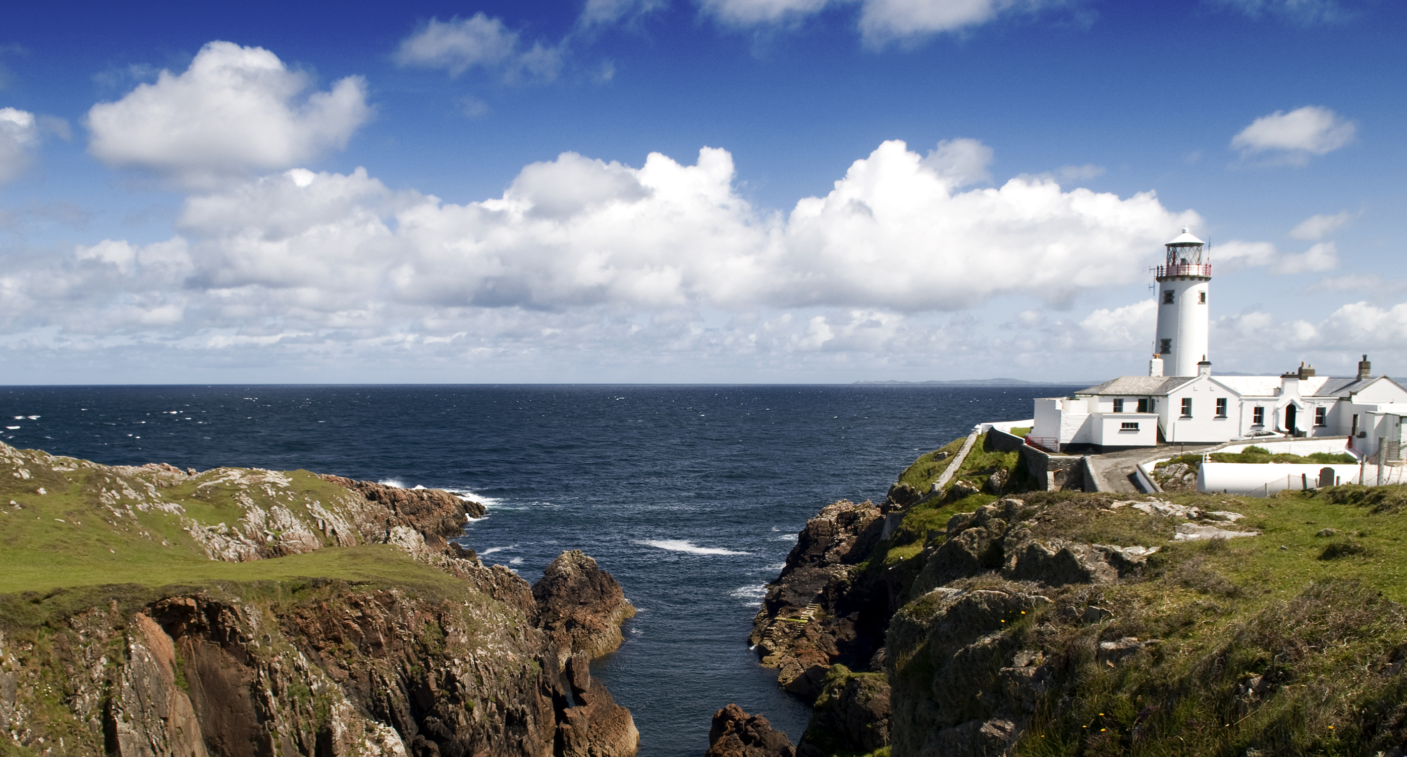 Wide take